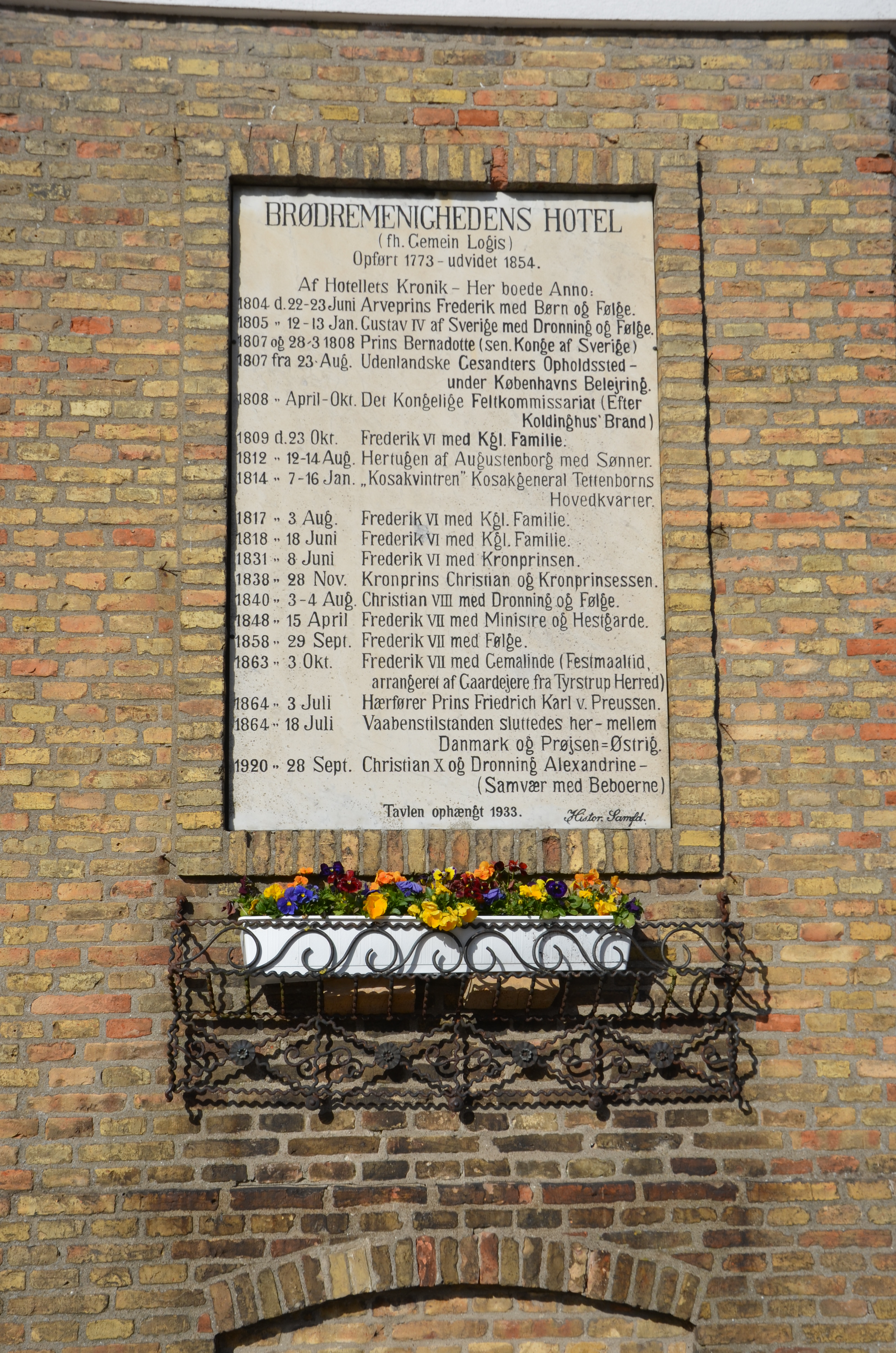 Tavla över händelser på Brödramenighetens Hotel i Christiansfeld, uppsatt på husgaveln